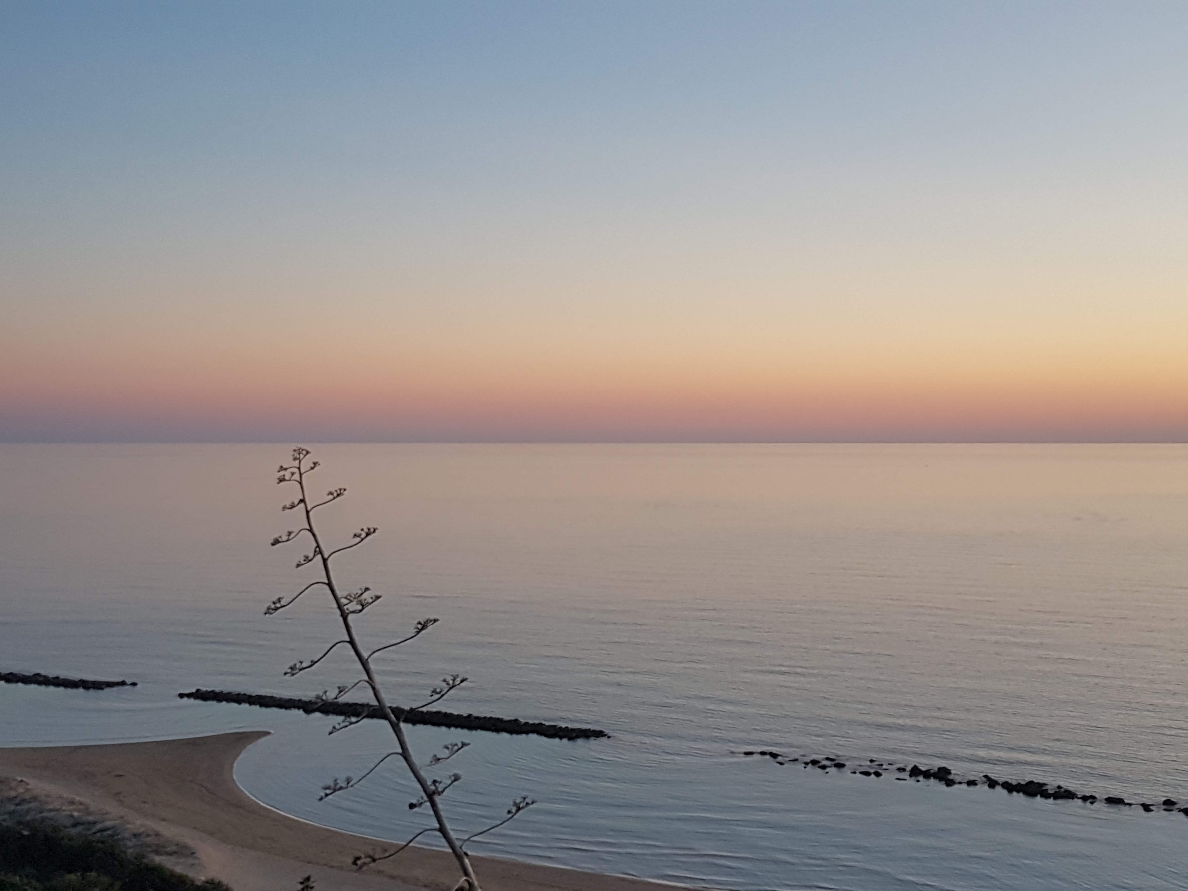 Spiaggia di Maddalusa